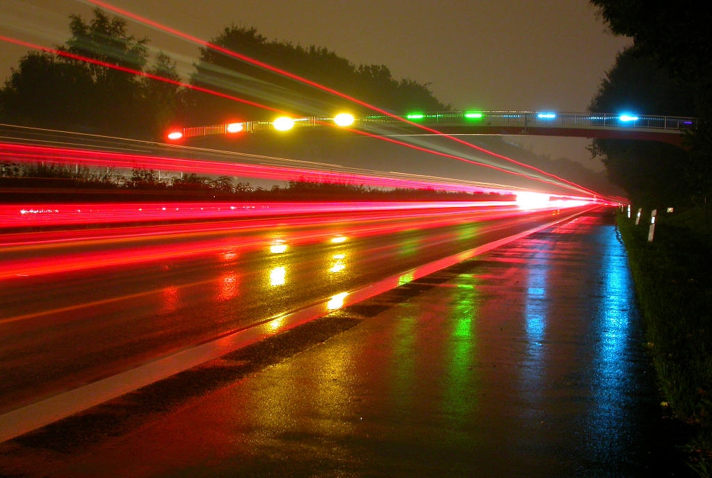 Öffentliches Autobahn Lichtkunstwerk „Regenbogenbrücke“ Dortmund